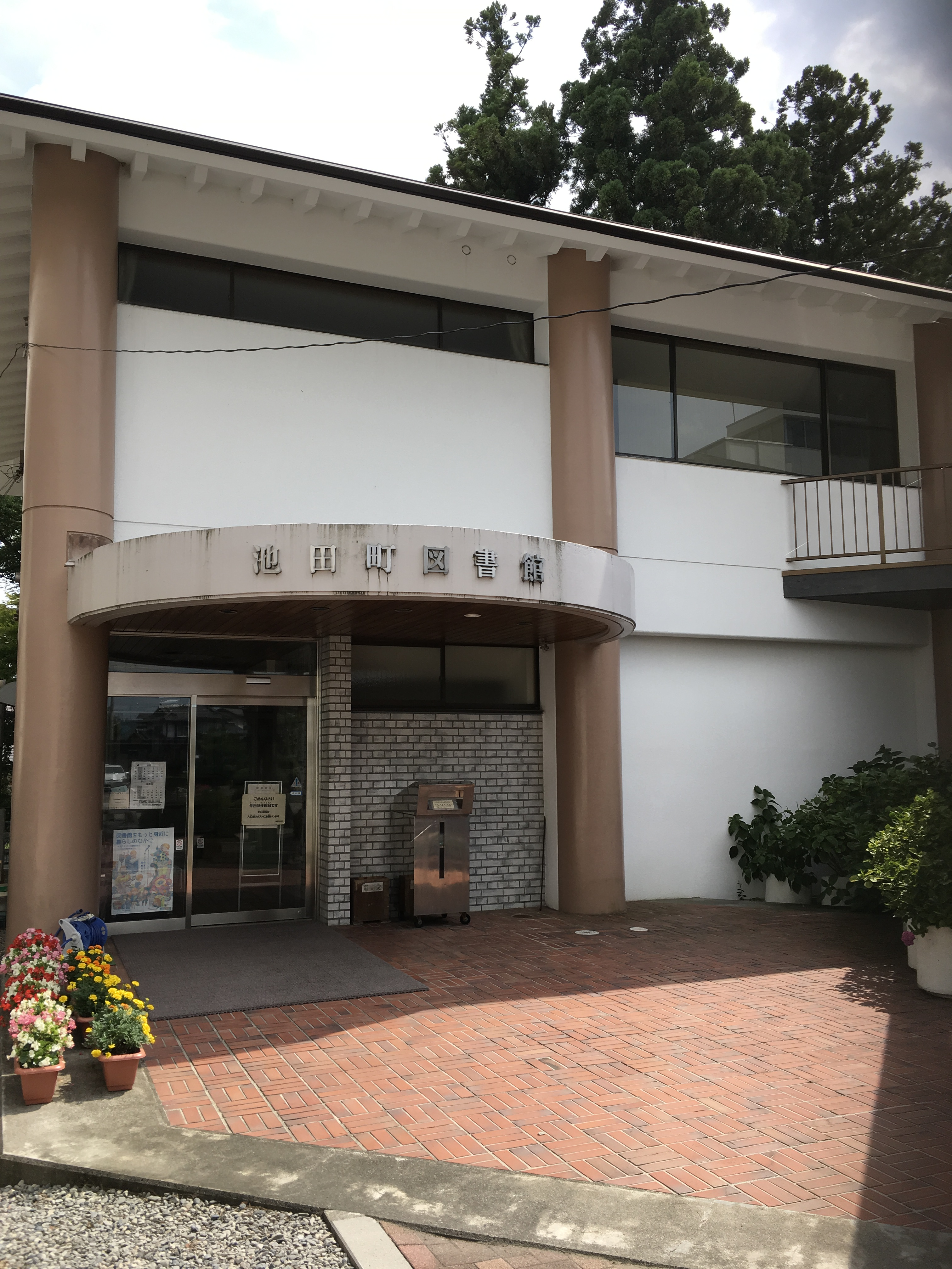 長野県北安曇郡池田町の公立図書館